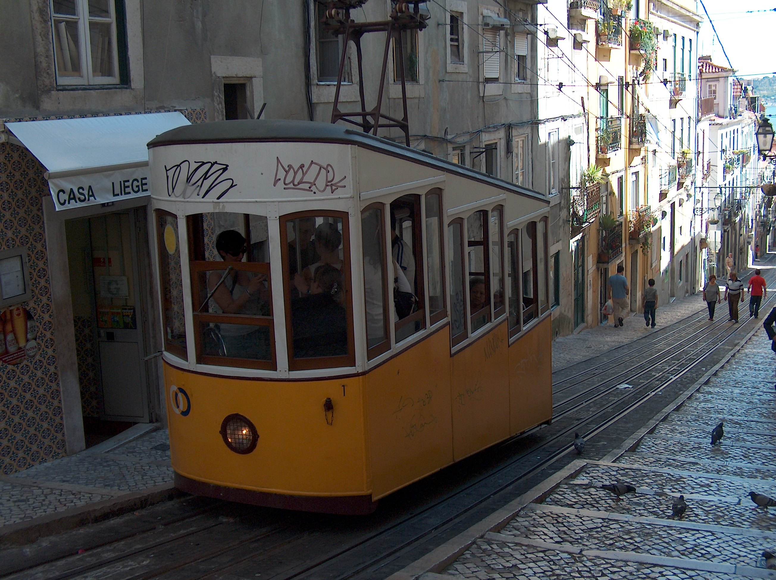 Elevador da Bica. Situado no Bairro da Bica em Lisboa, Portugal.